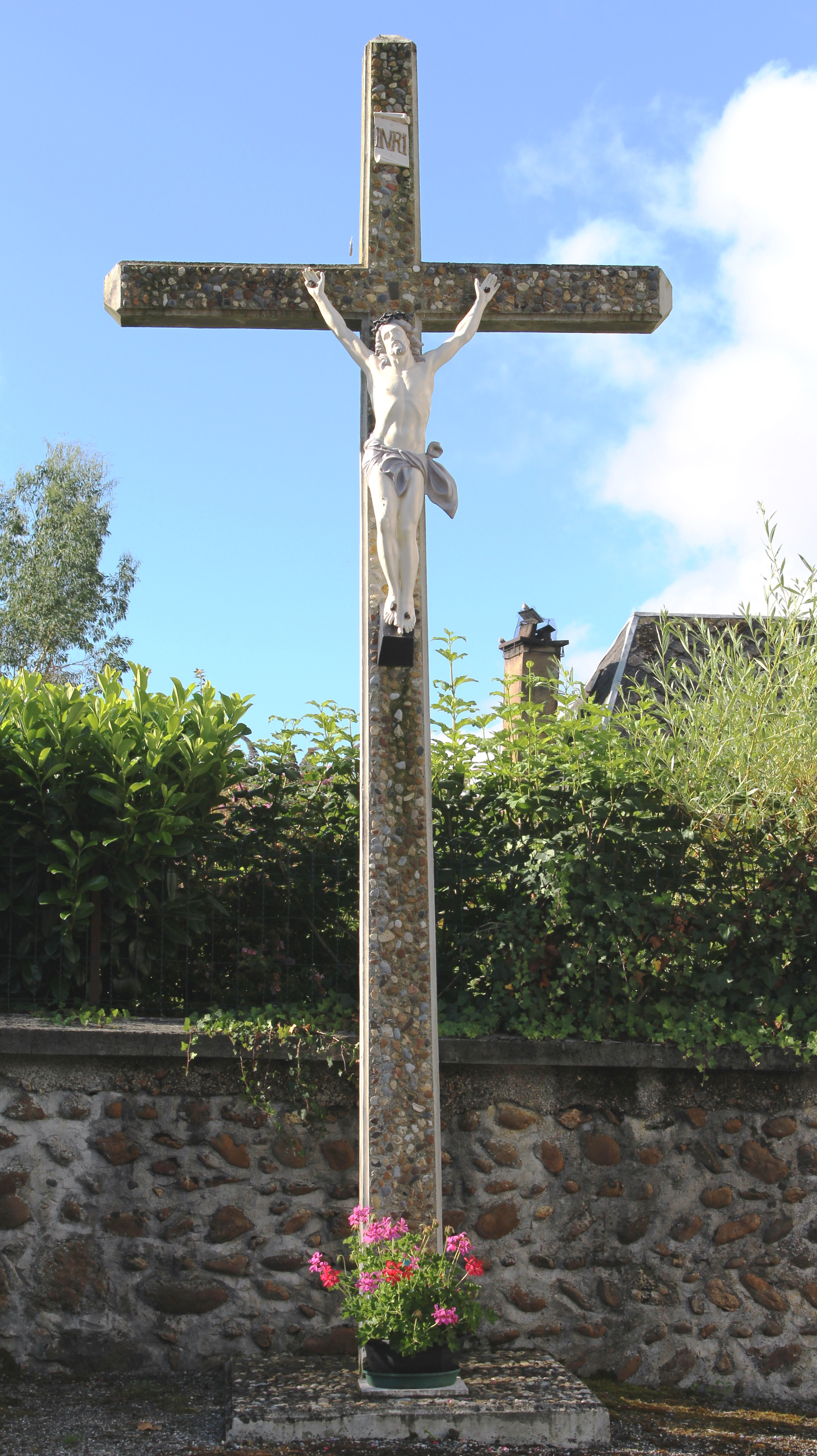 Croix de Ricaud (Hautes-Pyrénées)